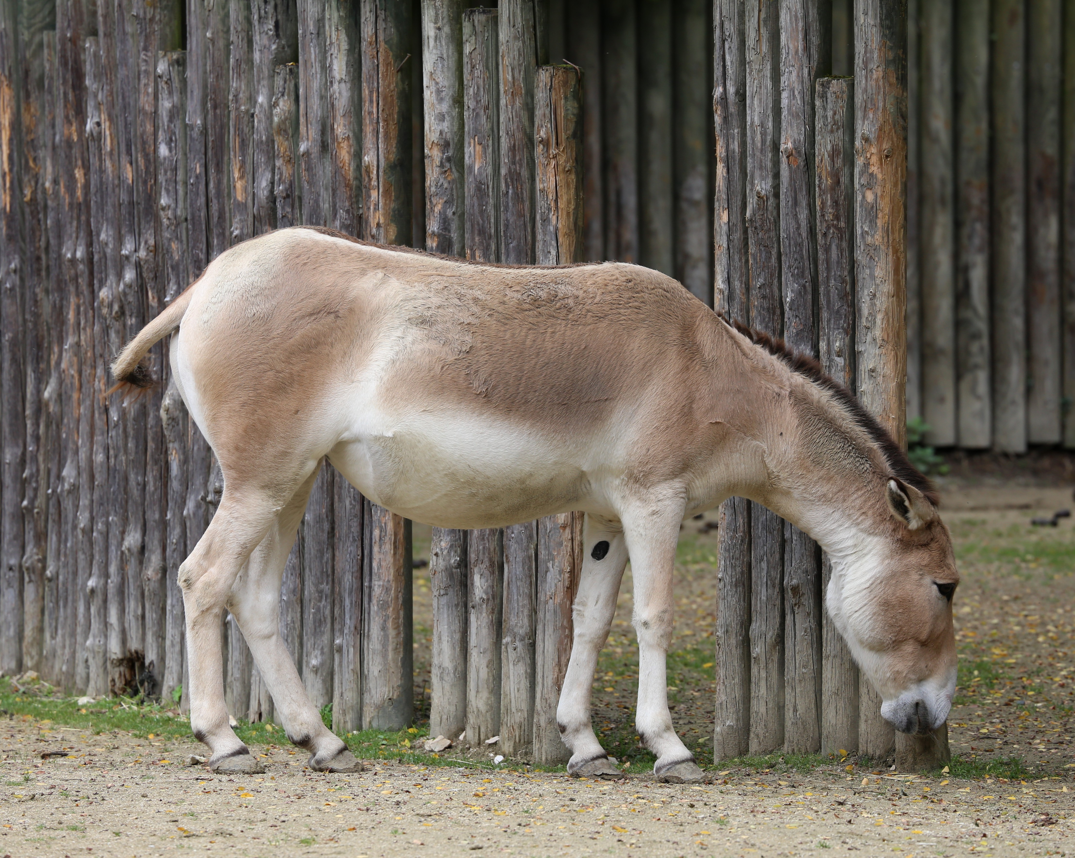 Onager (Asiatischer Wildesel), Equus hemionus onager, Zoo Augsburg